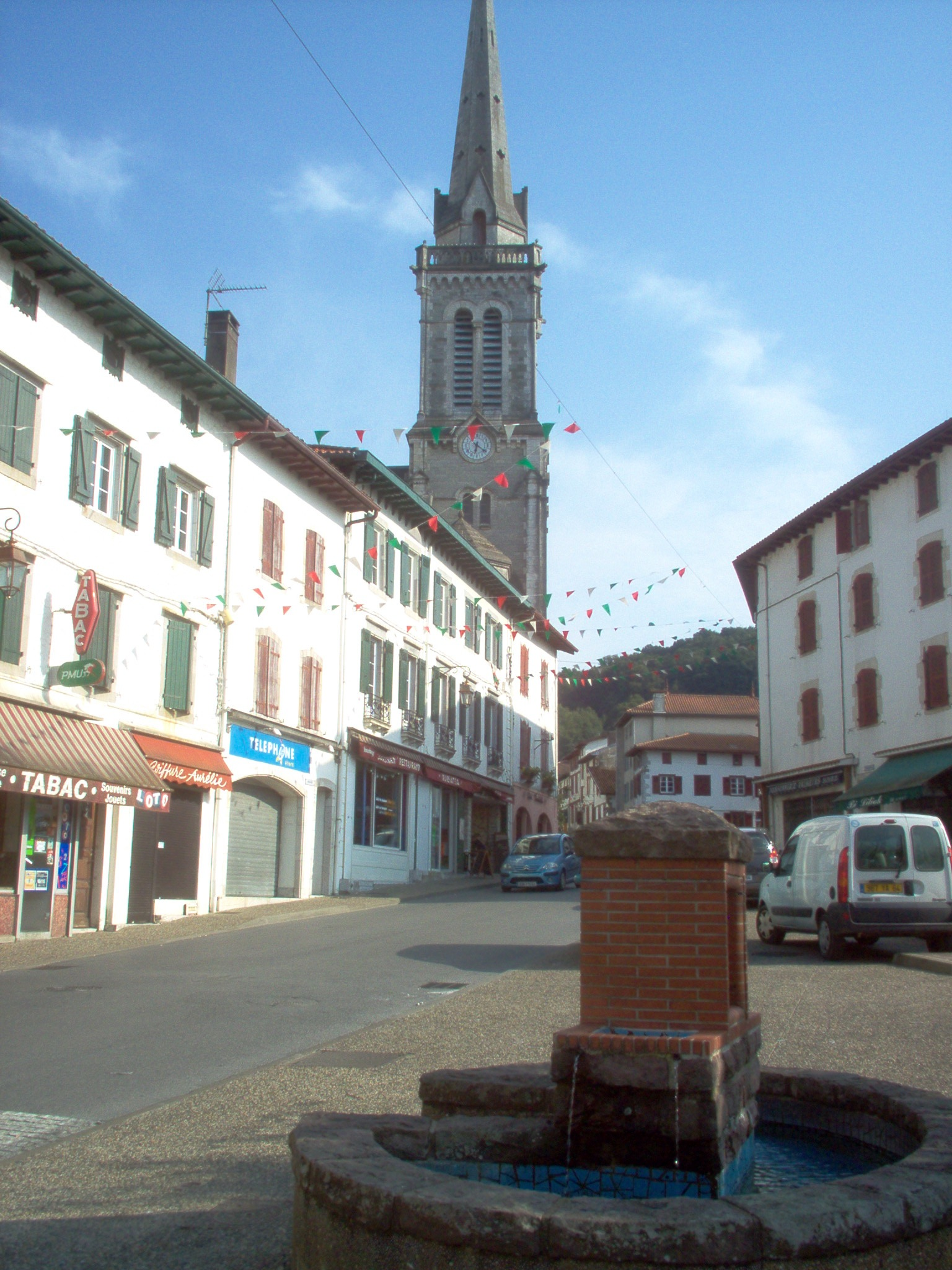 ville d'Hasparren (F-64240, Aquitaine). Eglise de Saint Jean-Baptiste vue par rue Francis Jammes.